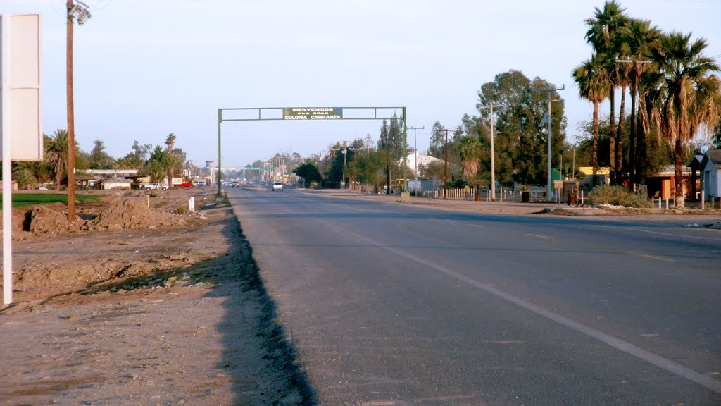 Entrada del Poblado Alberto Oviedo Mota (Reacomodo)